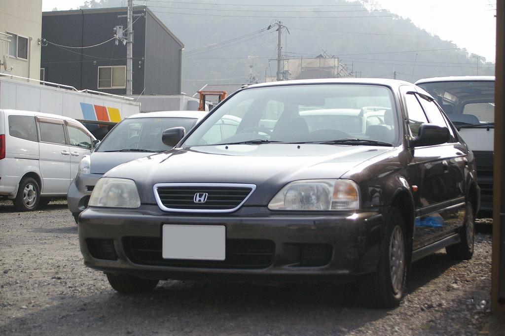 インテグラＳＪ